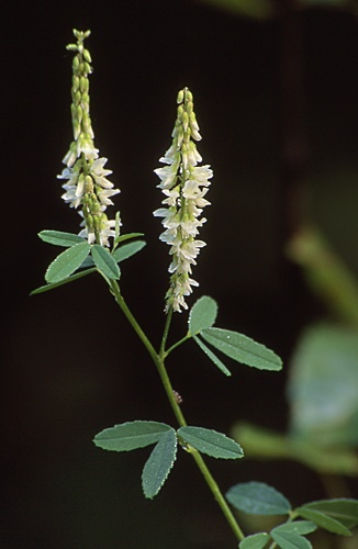 Nostrzyk biały (Melilotus alba)